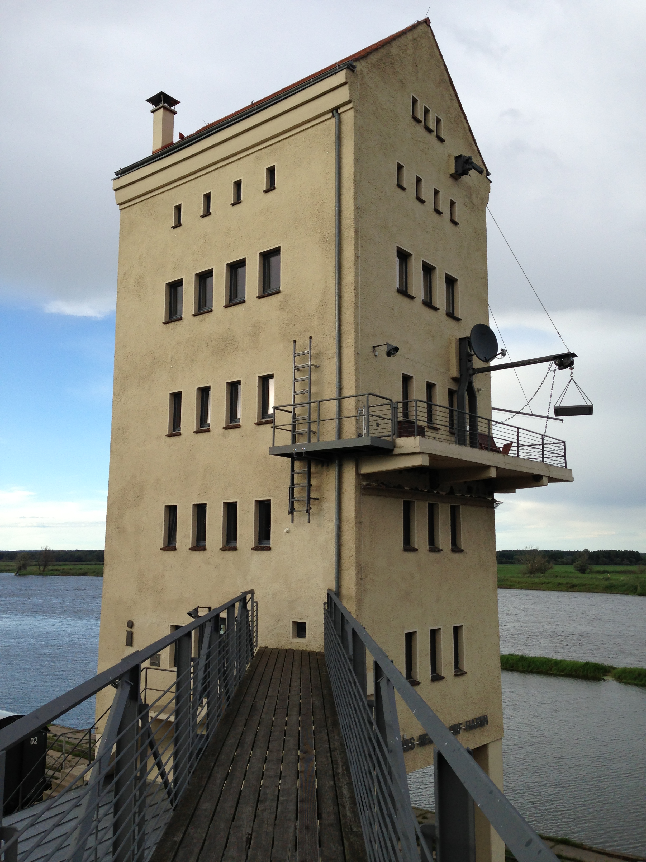 Verladeturm in Groß Neuendorf, an der Oder (Gemeinde Letschin, Brandenburg)